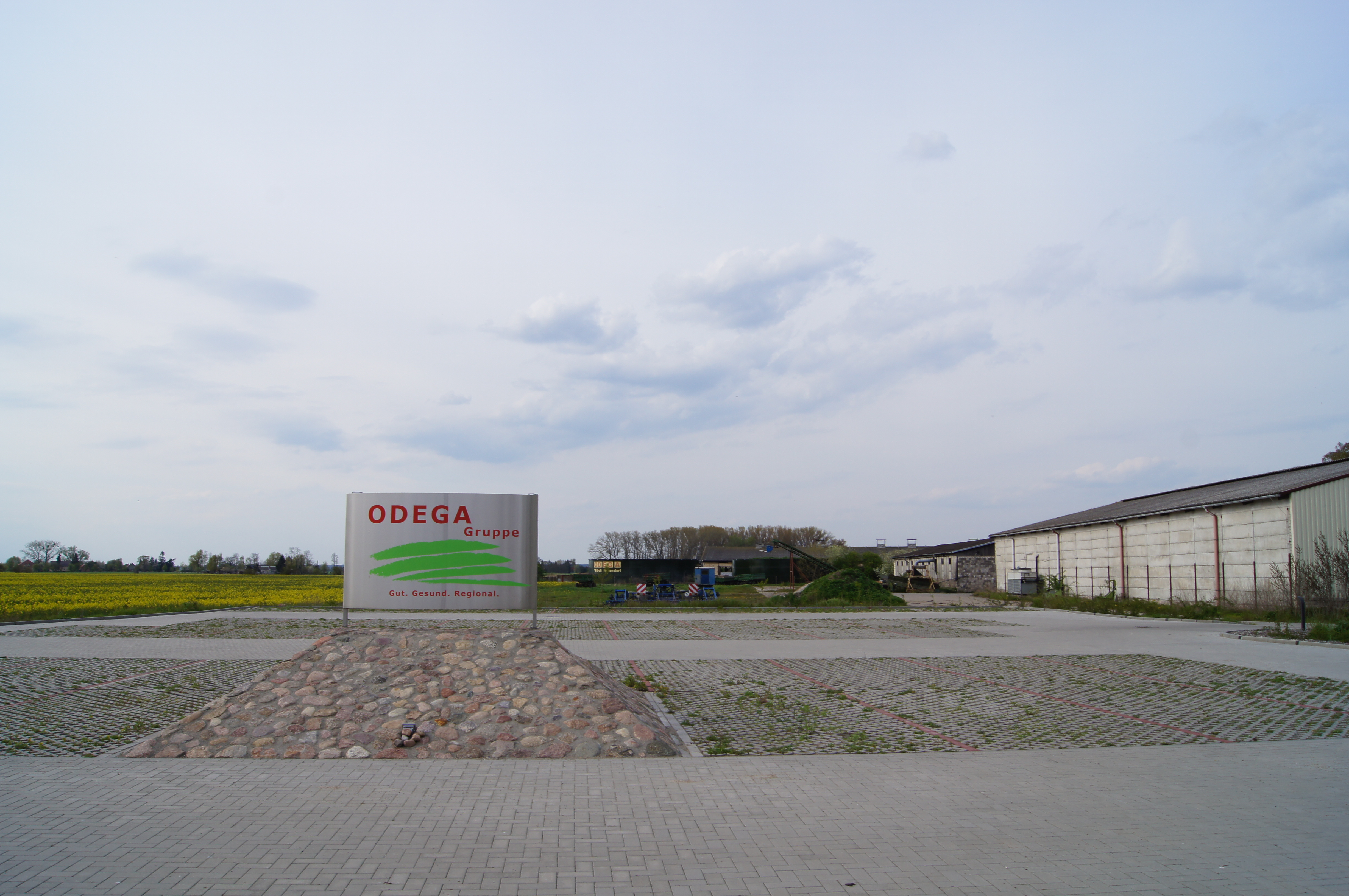 ODEGA in Groß Neuendorf, Brandenburg, Deutschland